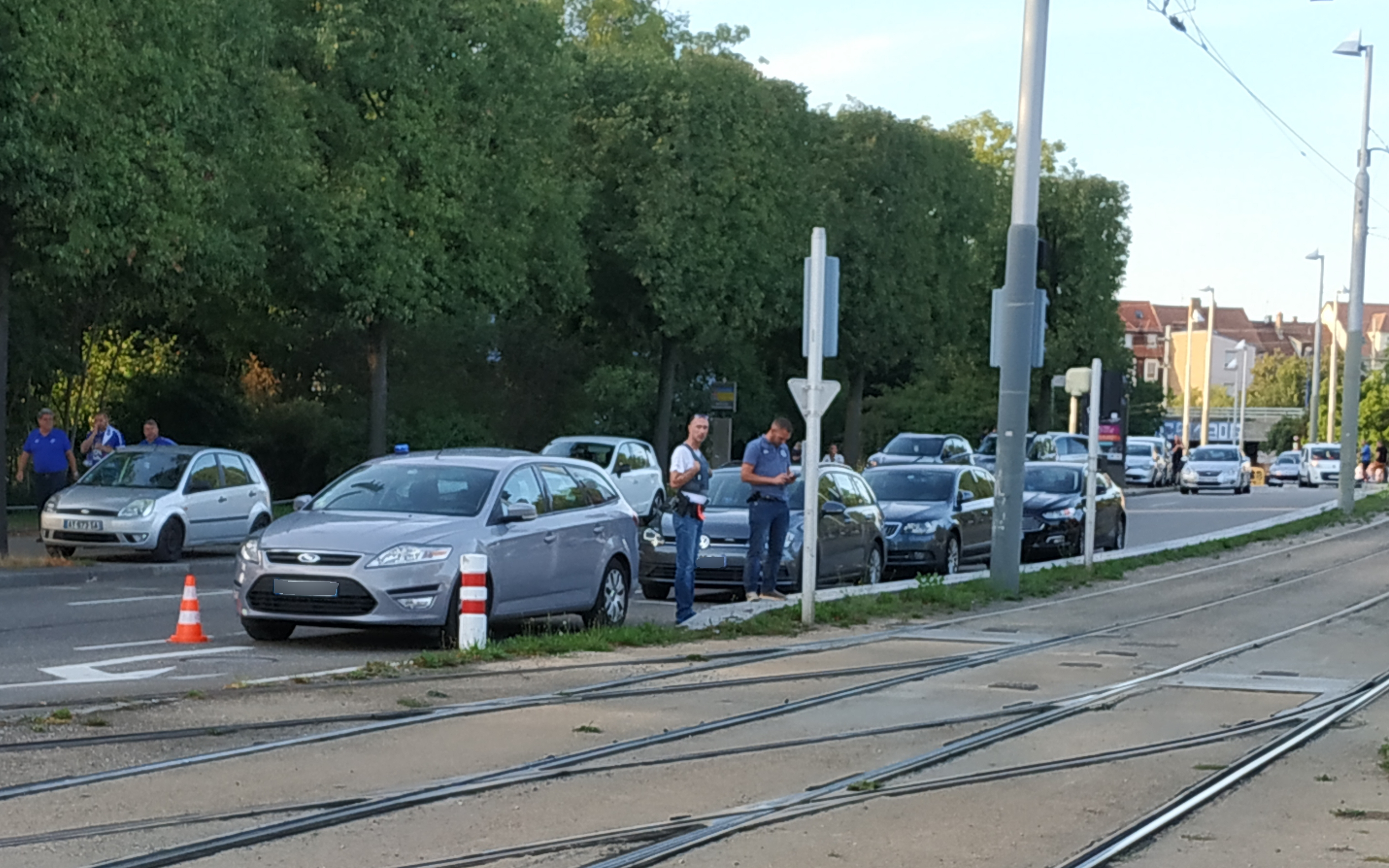 Voitures de la BAC aux abords du Stade de la Meinau, lors du match Racing-Eintracht Francfort à Strasbourg (22 août 2019)